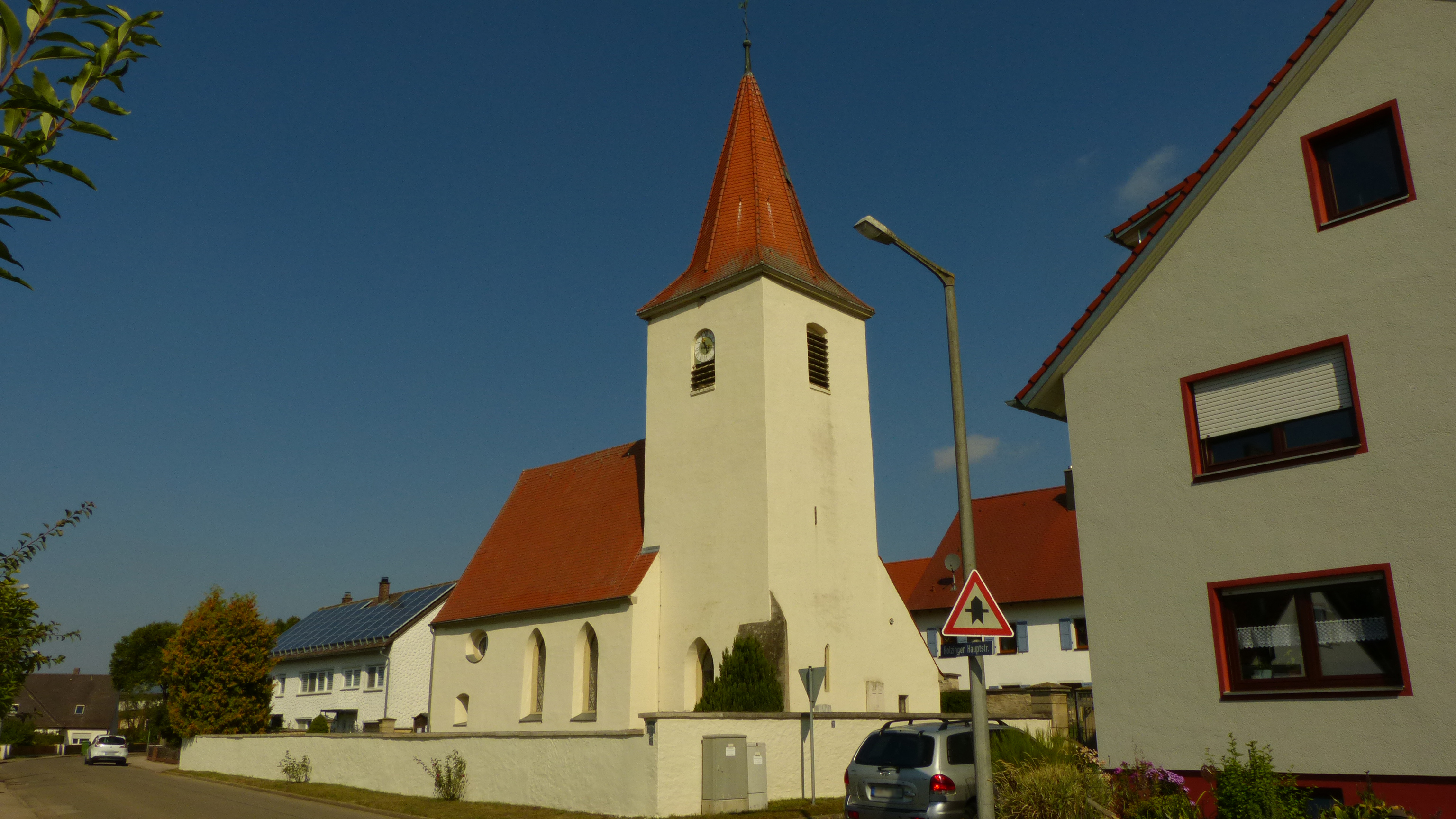 Evangelisch-lutherische Pfarrkirche Sankt Margaretha in Holzingen, Stadt Weißenburg in BayernThis is a photograph of an architectural monument.